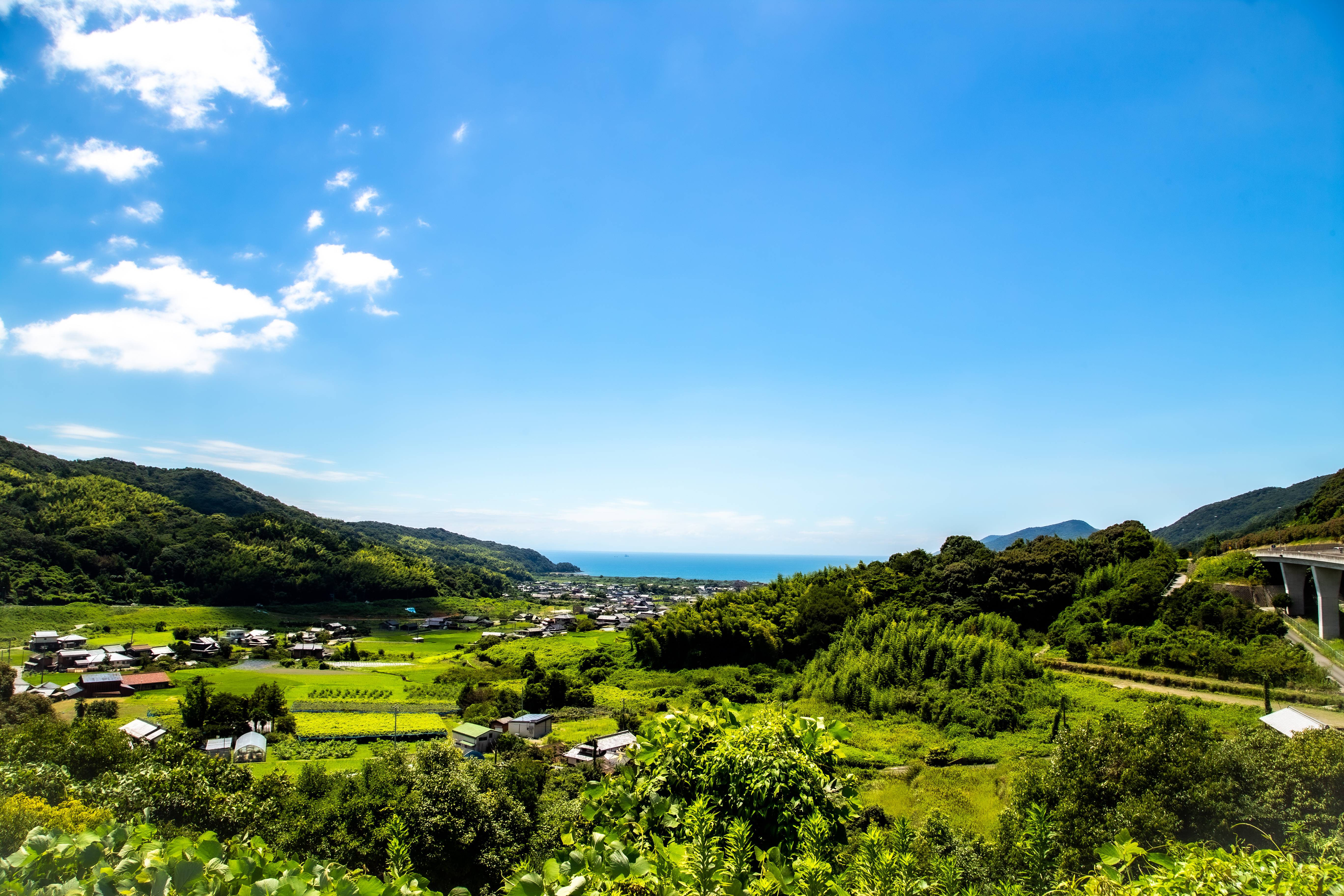 山口県防府市富海、富海パーキングエリアにて。